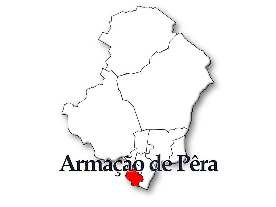 Censos 1864/2011